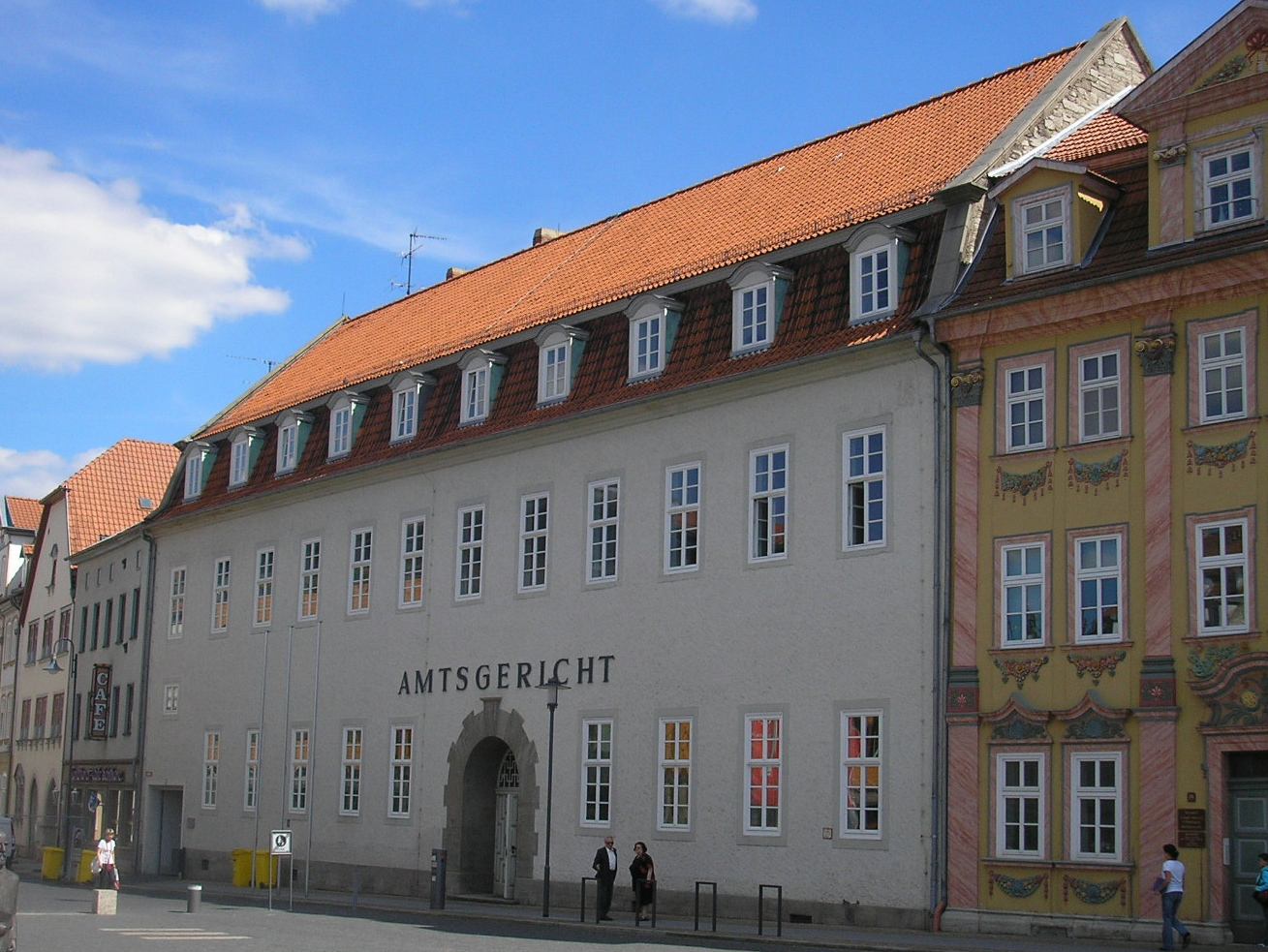 Das Amtsgericht Mühlhausen (Thüringen).